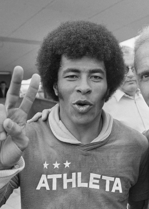 WK 74, training Brazilie; Jairzinho